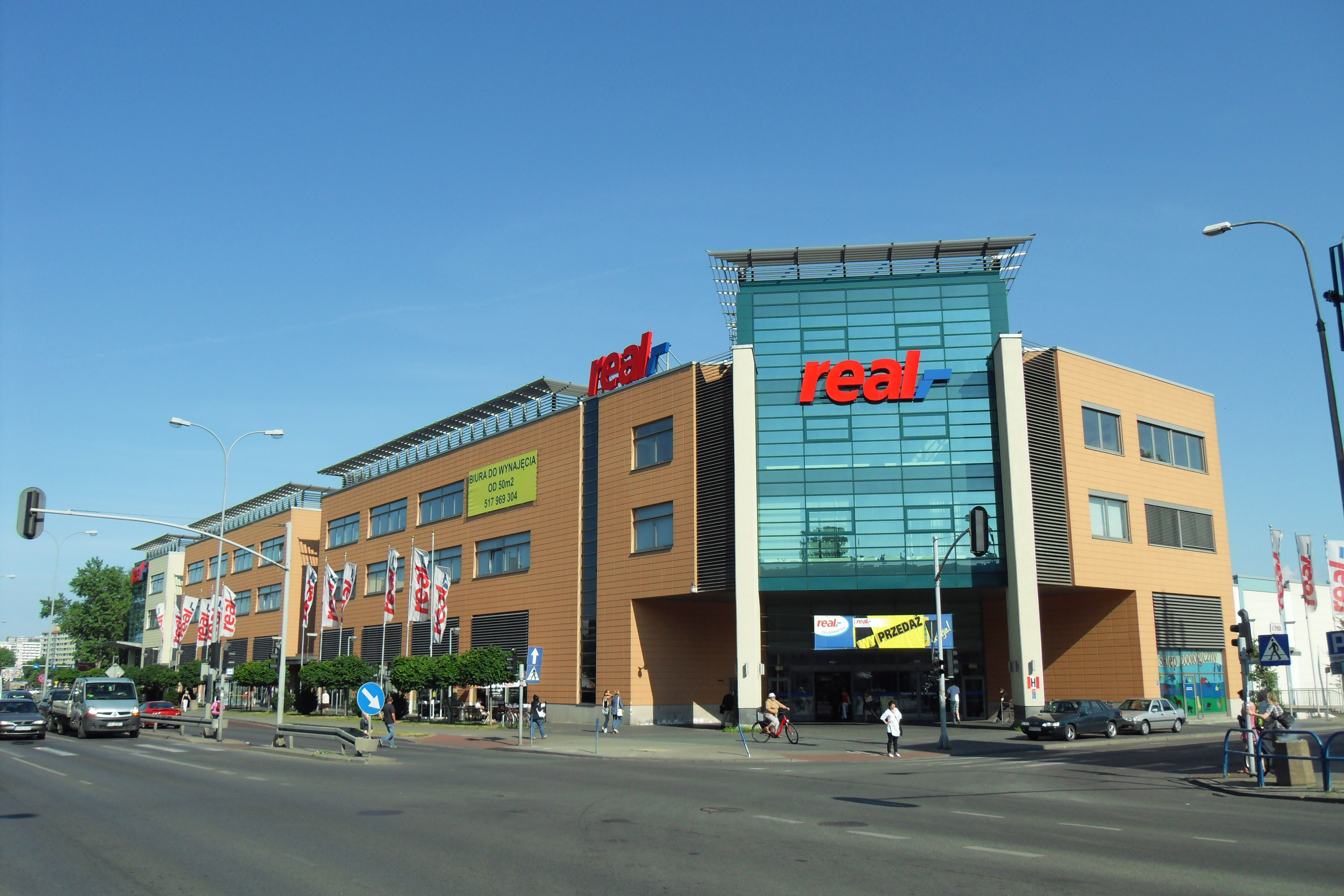 Gdańsk Przymorze Małe, hipermarket Real przy ul. Kołobrzeskiej 32.